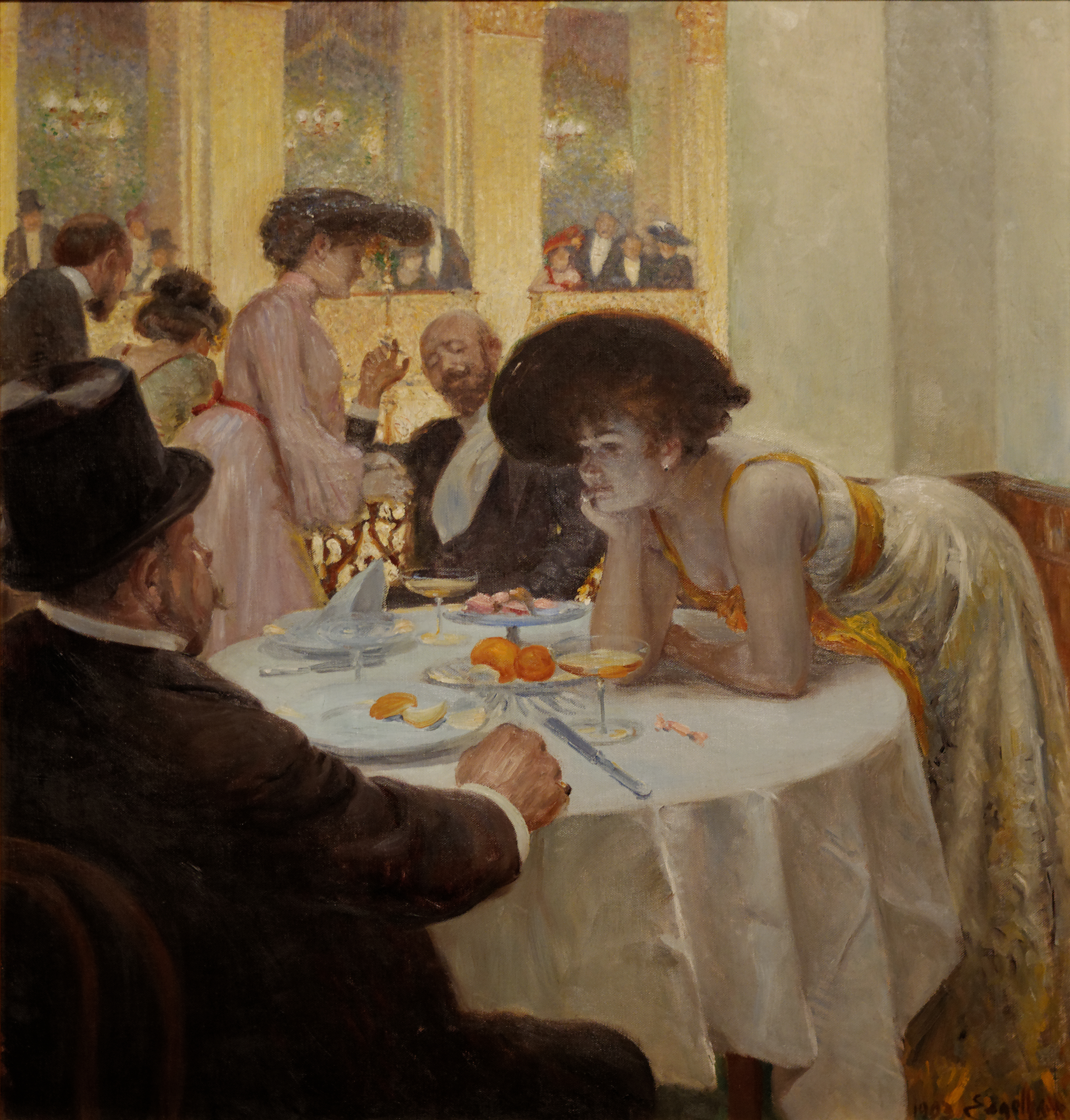 Loge im Sofiensaal.title QS:P1476,de:"Loge im Sofiensaal." label QS:Lde,"Loge im Sofiensaal."